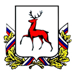 Afbeelding: Wapen vd Russische stad Nizjni Novgorod